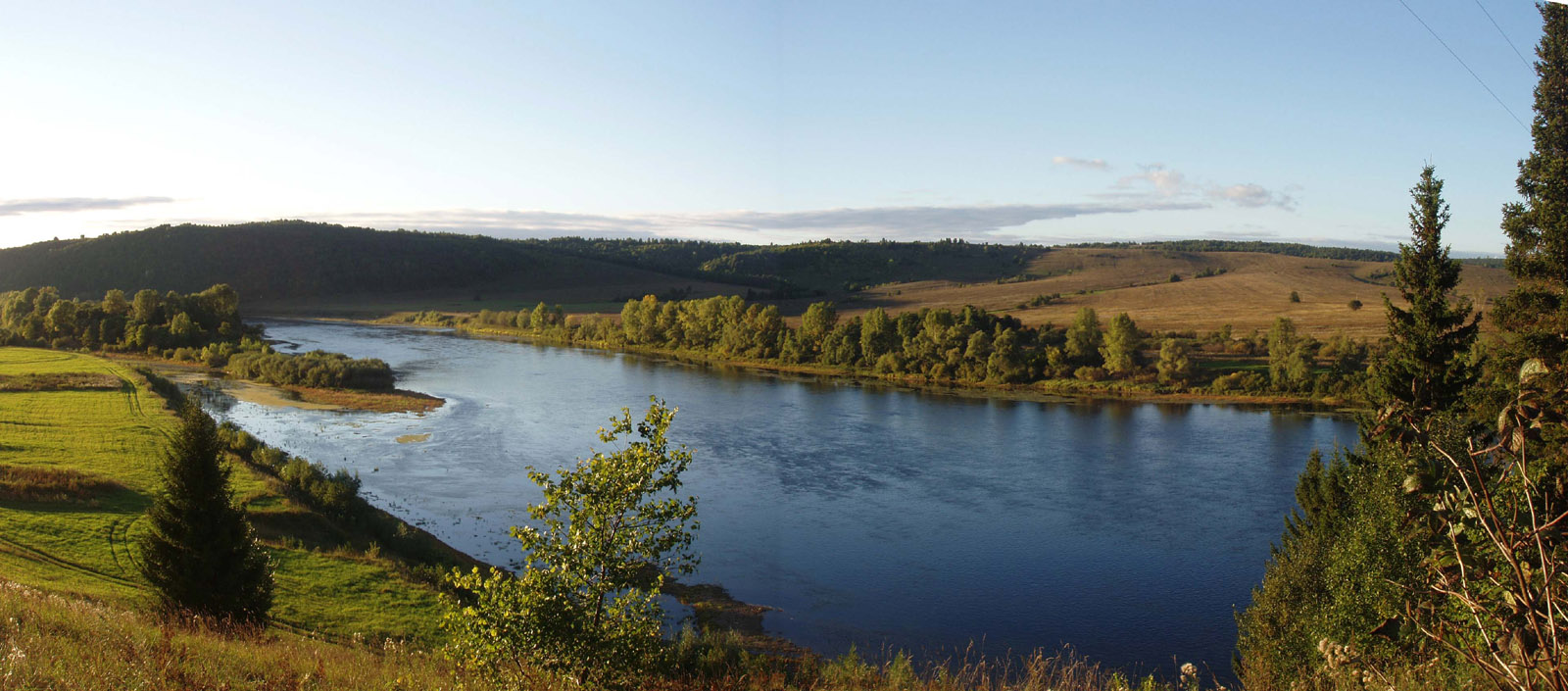 Река Уфа осенью. Излучина у деревни Иркенлек Нуримановского района Республики Башкортостан